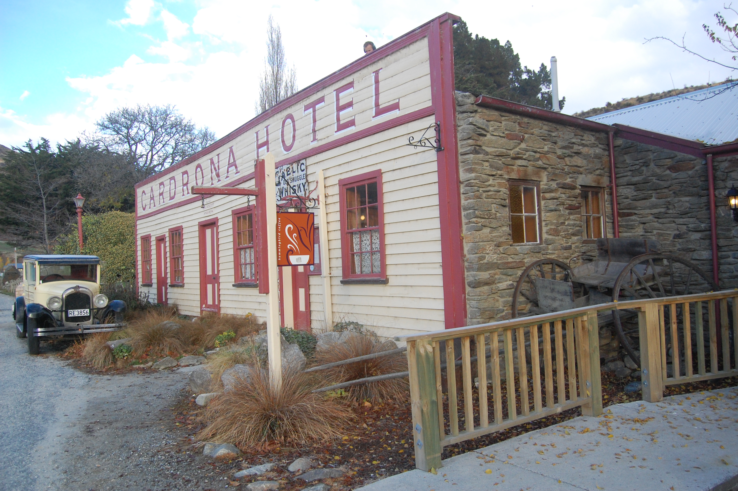 Cardrona